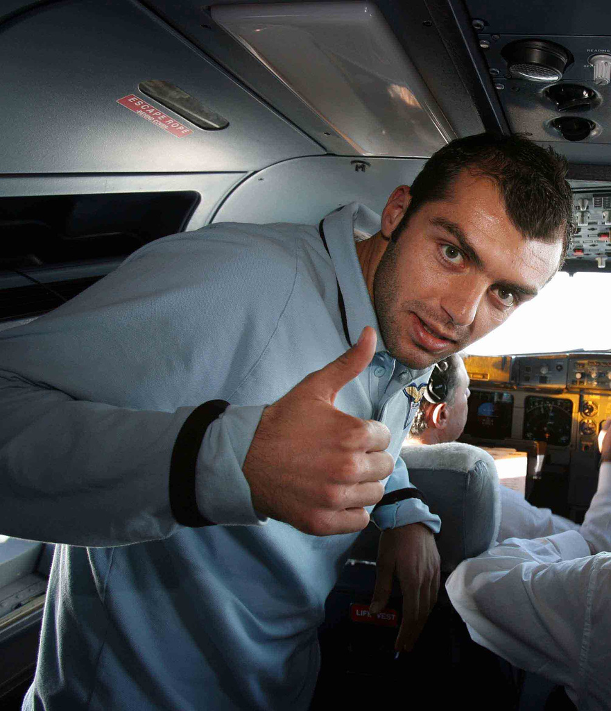 Goran Pandev fotografato dopo un allenamento.